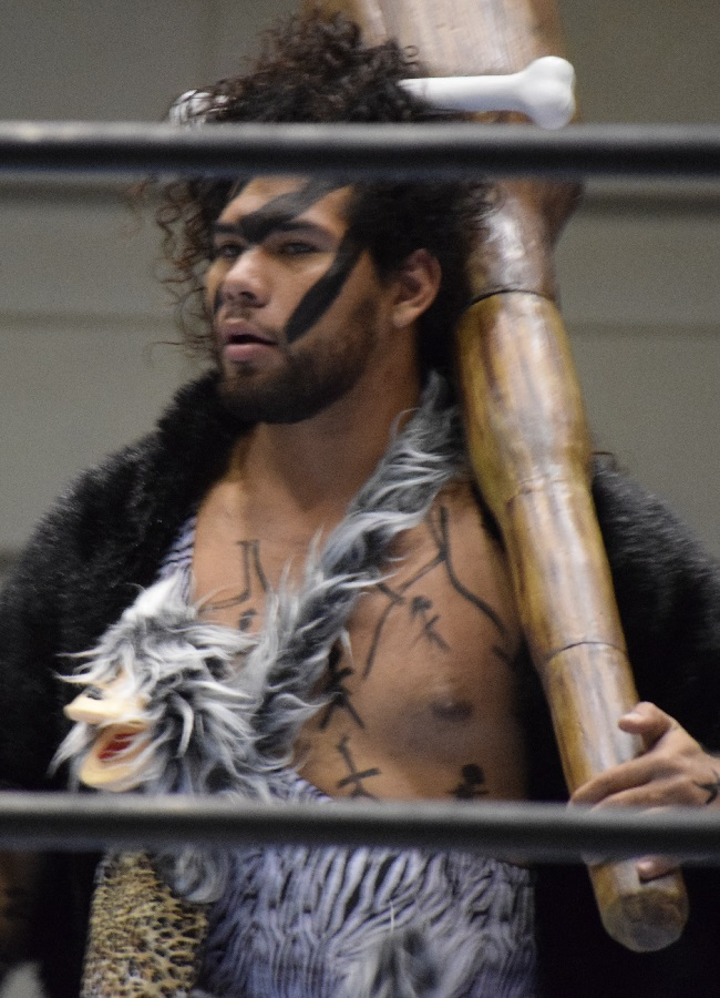 2017年1月13日 大阪府立体育会館・第二競技場「CMLL FANTASTICA MANIA 2017」 バルバロ・カベルナリオ